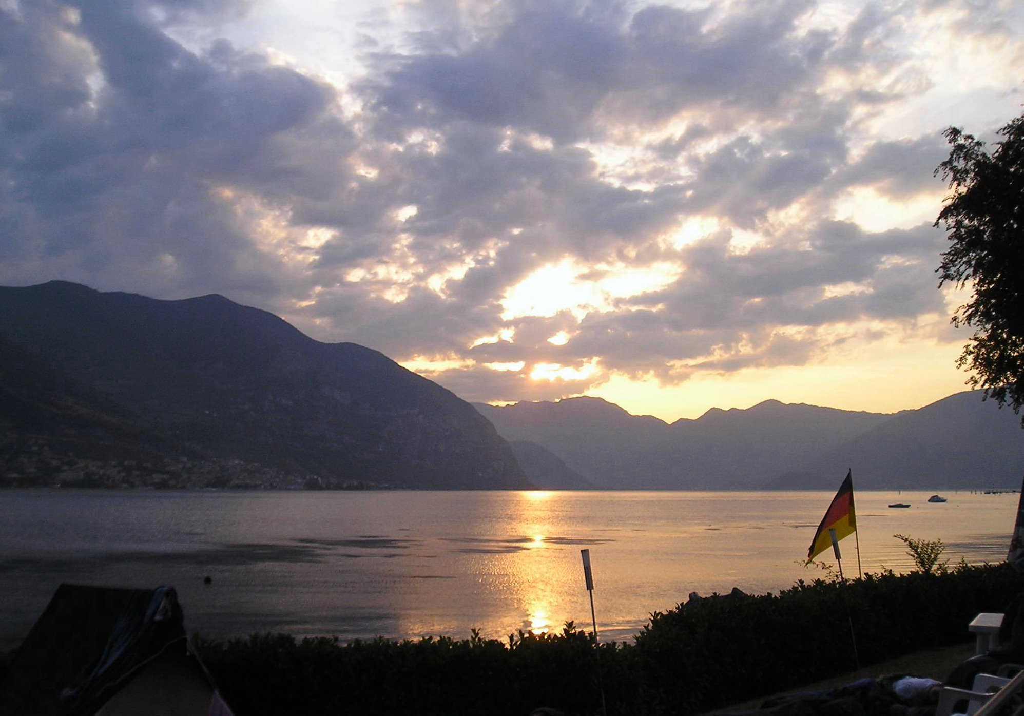 Lago d'Iseo all'alba, Paolo Ghilardi, immagine da me scattata, 2006